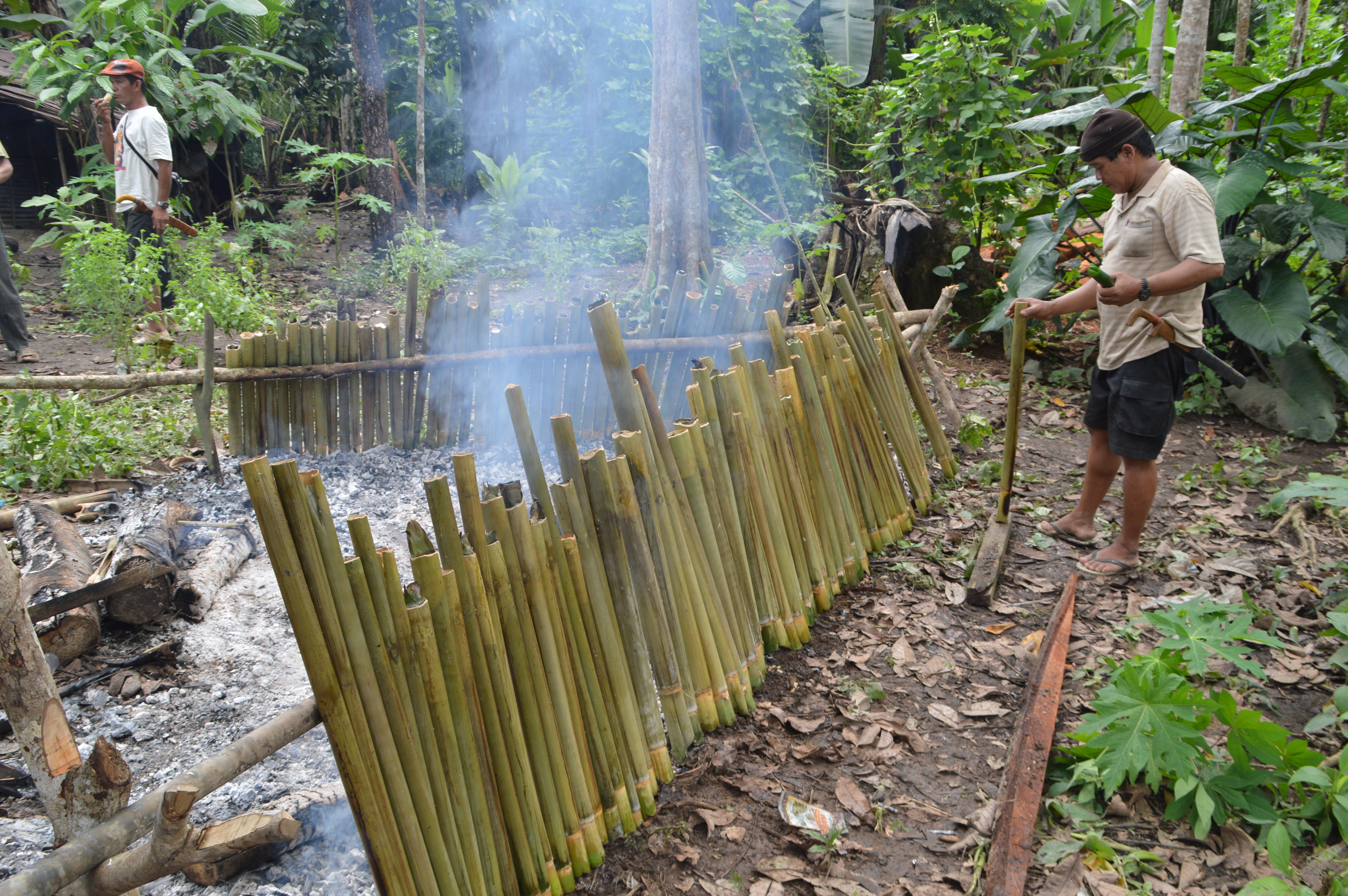 Warga etnis Dayak Deah di Kabupaten Tabalong, Kalimantan Selatan, sedang memasak lemang.